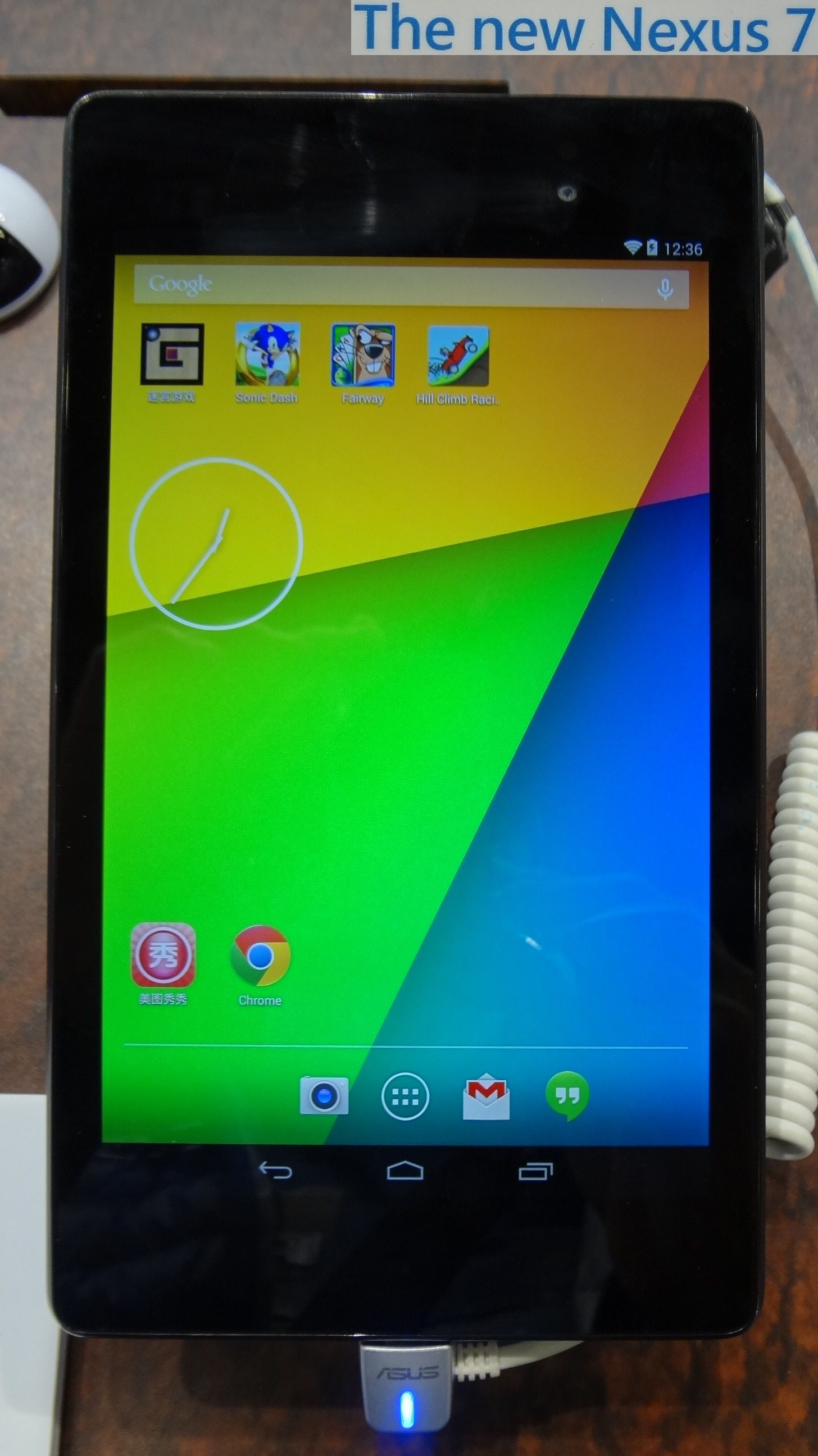 2013年資訊月的The new Nexus 7。